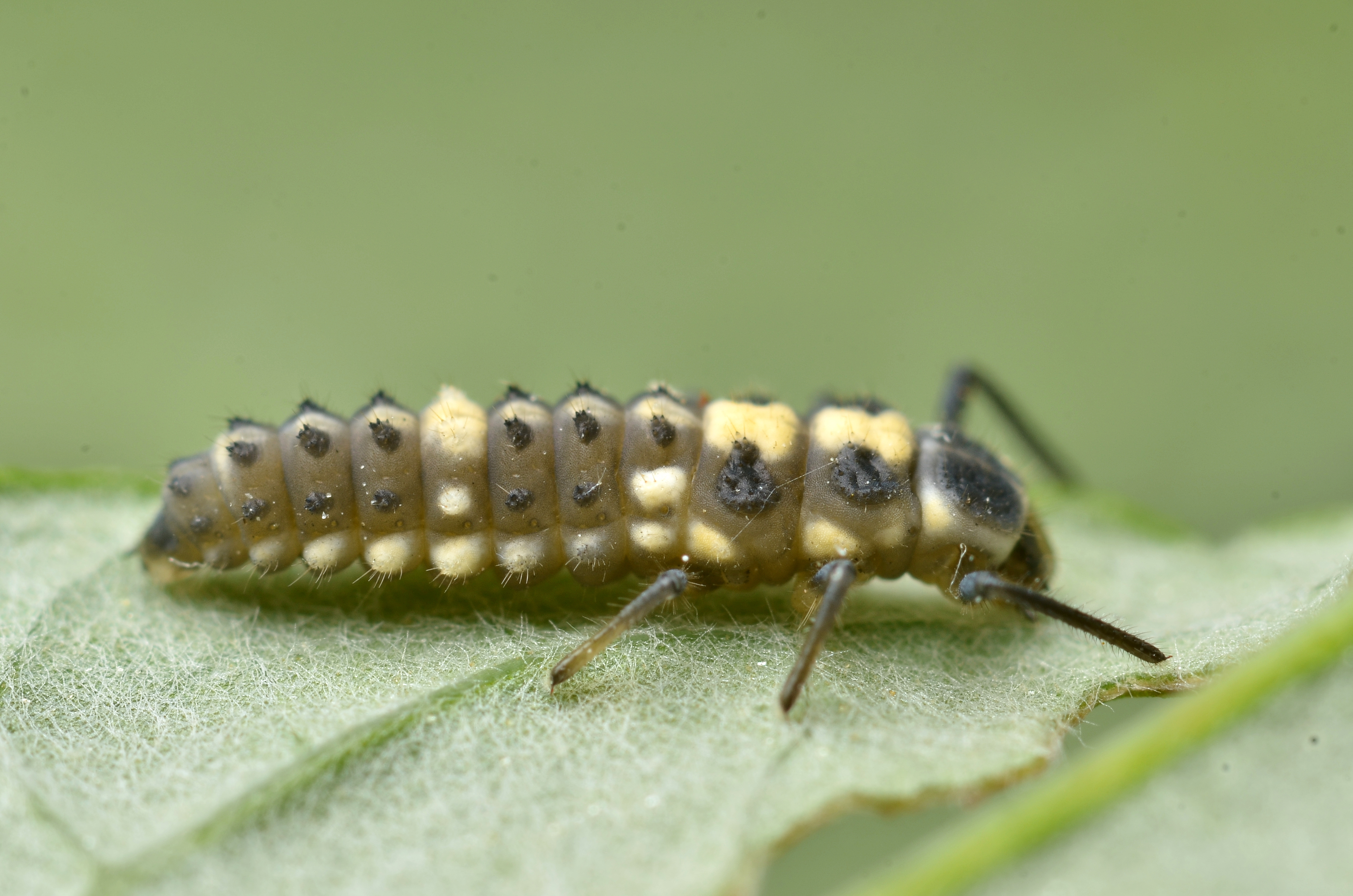 Propylea quatuordecimpunctata larvae